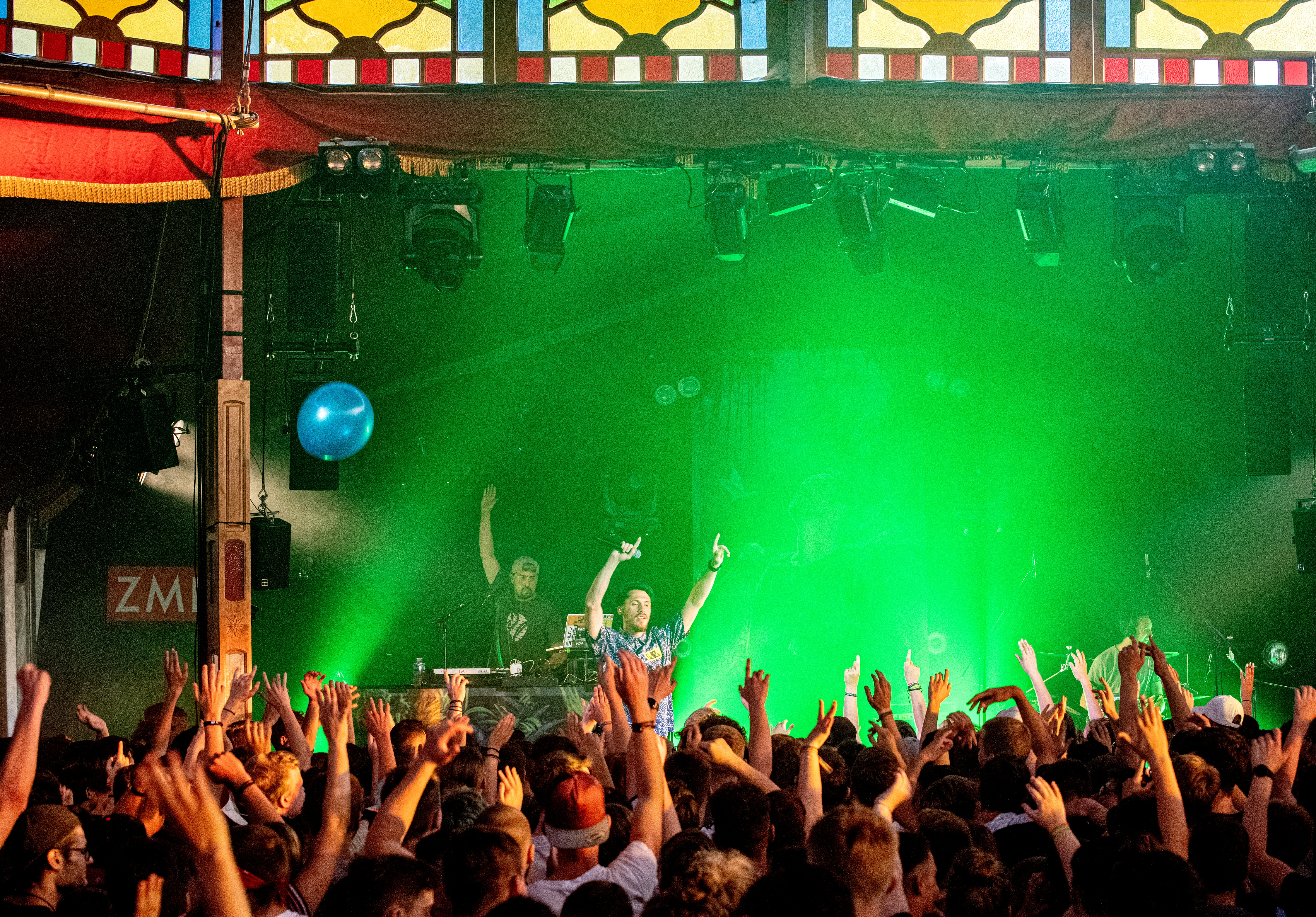 Bilder vom Zelt Musik Festival 2019 in Freiburg im Breisgau